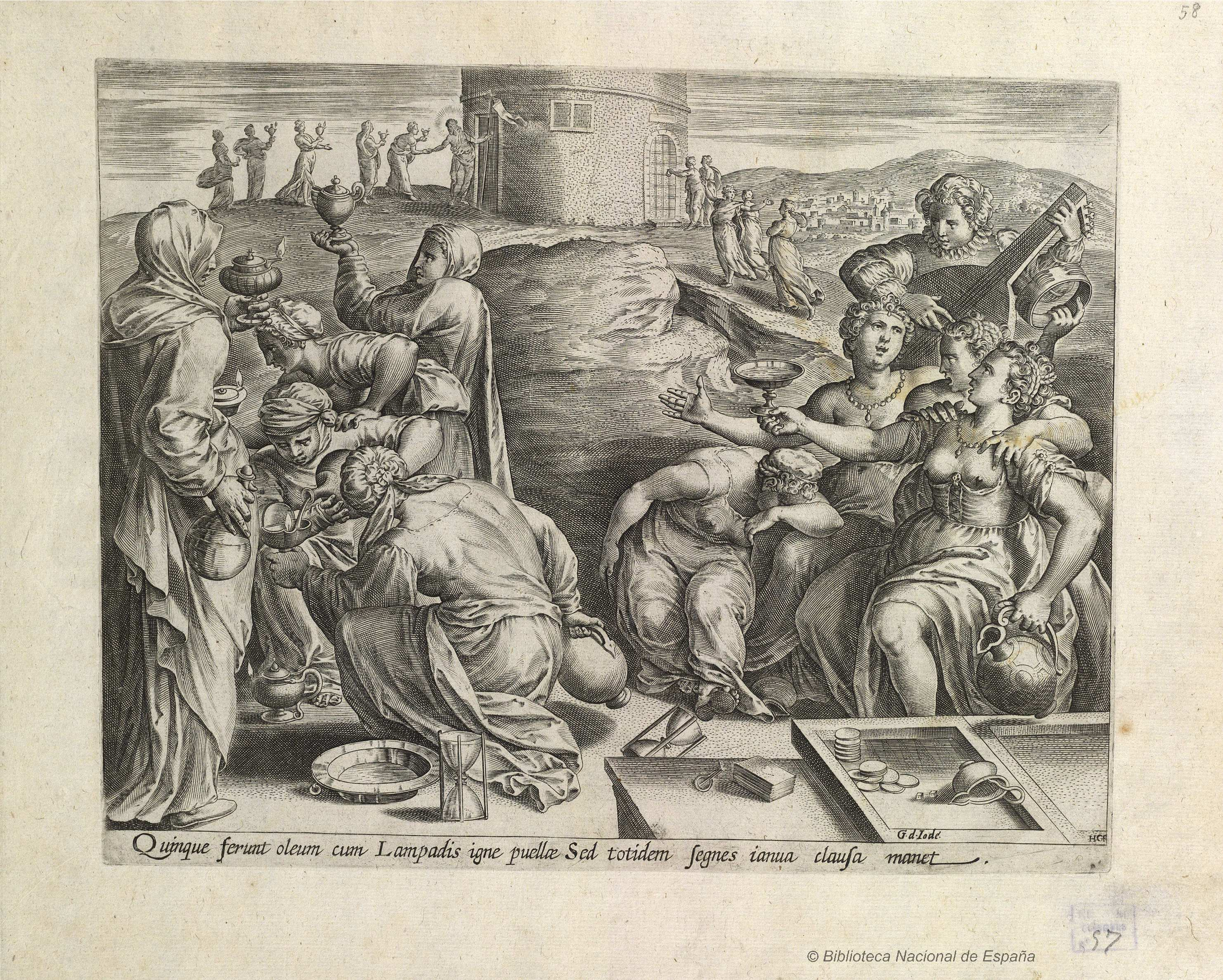 Hans Collaert, Las vírgenes prudentes, serie de las parábolas evangélicas editada por Gerard de Jode, Amberes, 1585. Las planchas usadas también en Historiae Sacrae Novi Testamenti, 1639. Biblioteca Nacional de España.